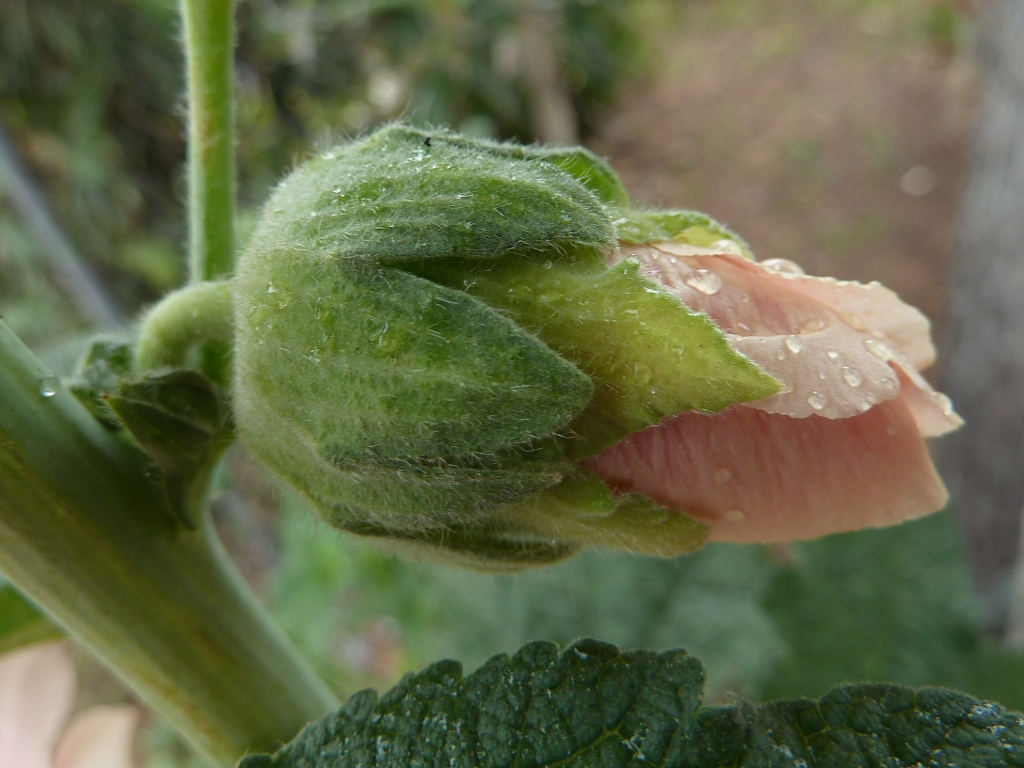 Alcea rosea (Malva real, Malva rosa, Malva loca) : Epicáliz, cáliz y flor incipiente - Camino de San Cayetano, Albatera (Alicante, España).